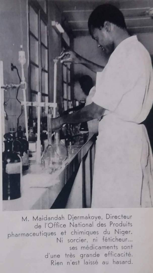 Premier pharmacien du Niger, Directeur de l'ONPPC, Office National des Produits Pharmaceutiques et Chimiques du Niger établit pas la loi N°62-36 du 18 septembre 1962